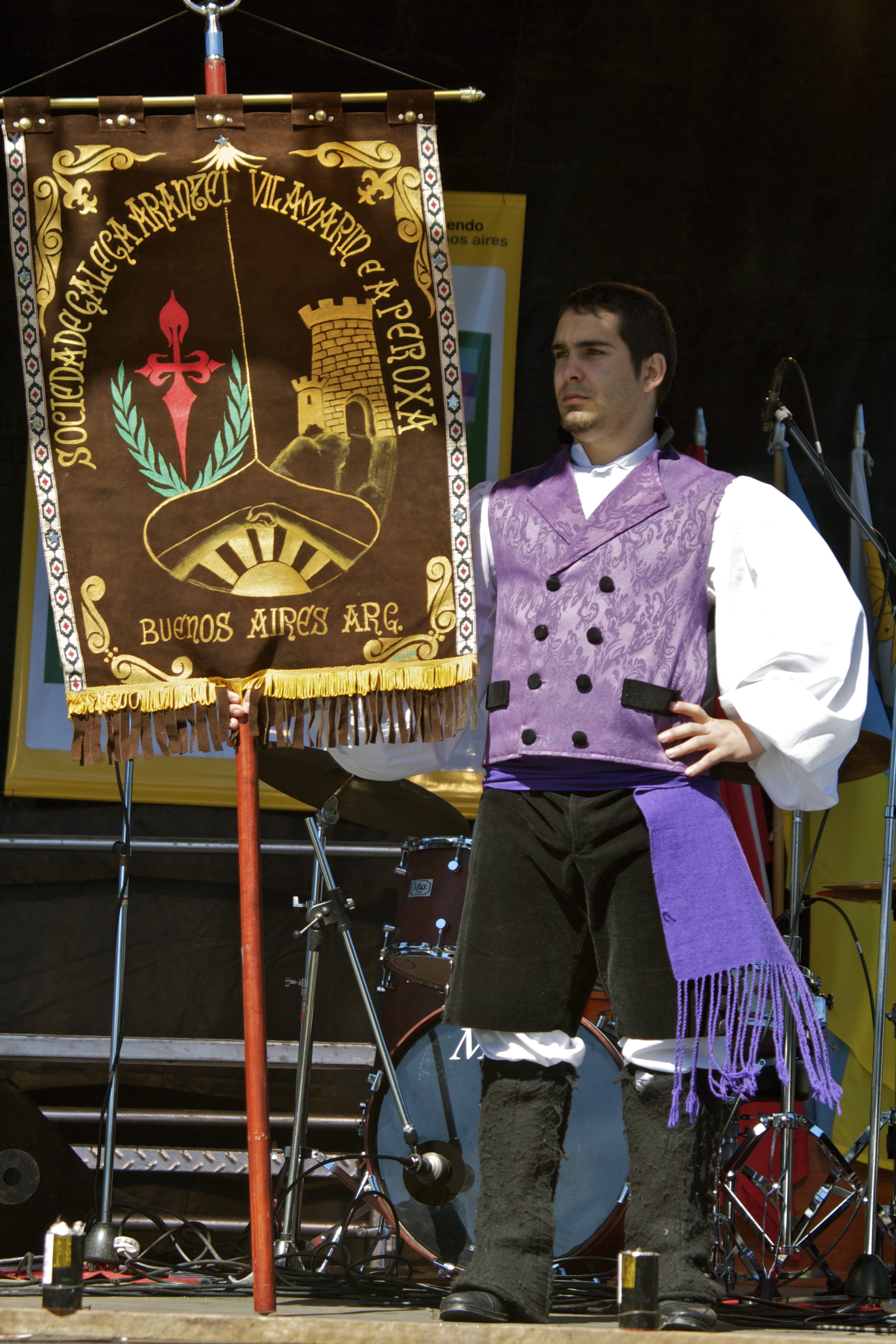 Dia del Inmigrante 2010 21